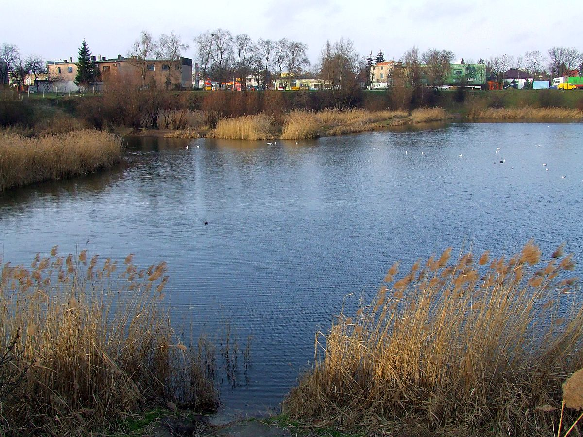 Ulica Połczyńska w Warszawie, Glinianka (geologia)